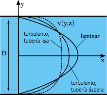 Comparación de perfiles de flujo en una tubería, traducida de la imagen en alemán